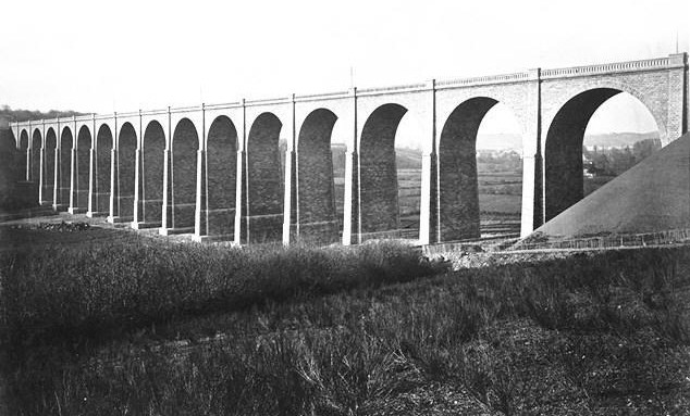 Le viaduc ferroviaire de Daoulas en 1873 (Finistère, Côtes-du-Nord : photographies / J. Duclos, photogr., 1873)